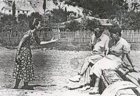 (1951), "Αντιγόνη" με το "Λύκειο Καλογραιών" για το Θέατρο ΡΕΞ, με την Τζένη Καρέζη σε διδασκαλία Θάνου Τράγκα